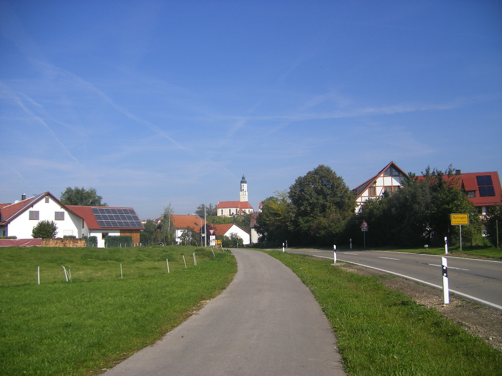 Öpfingen